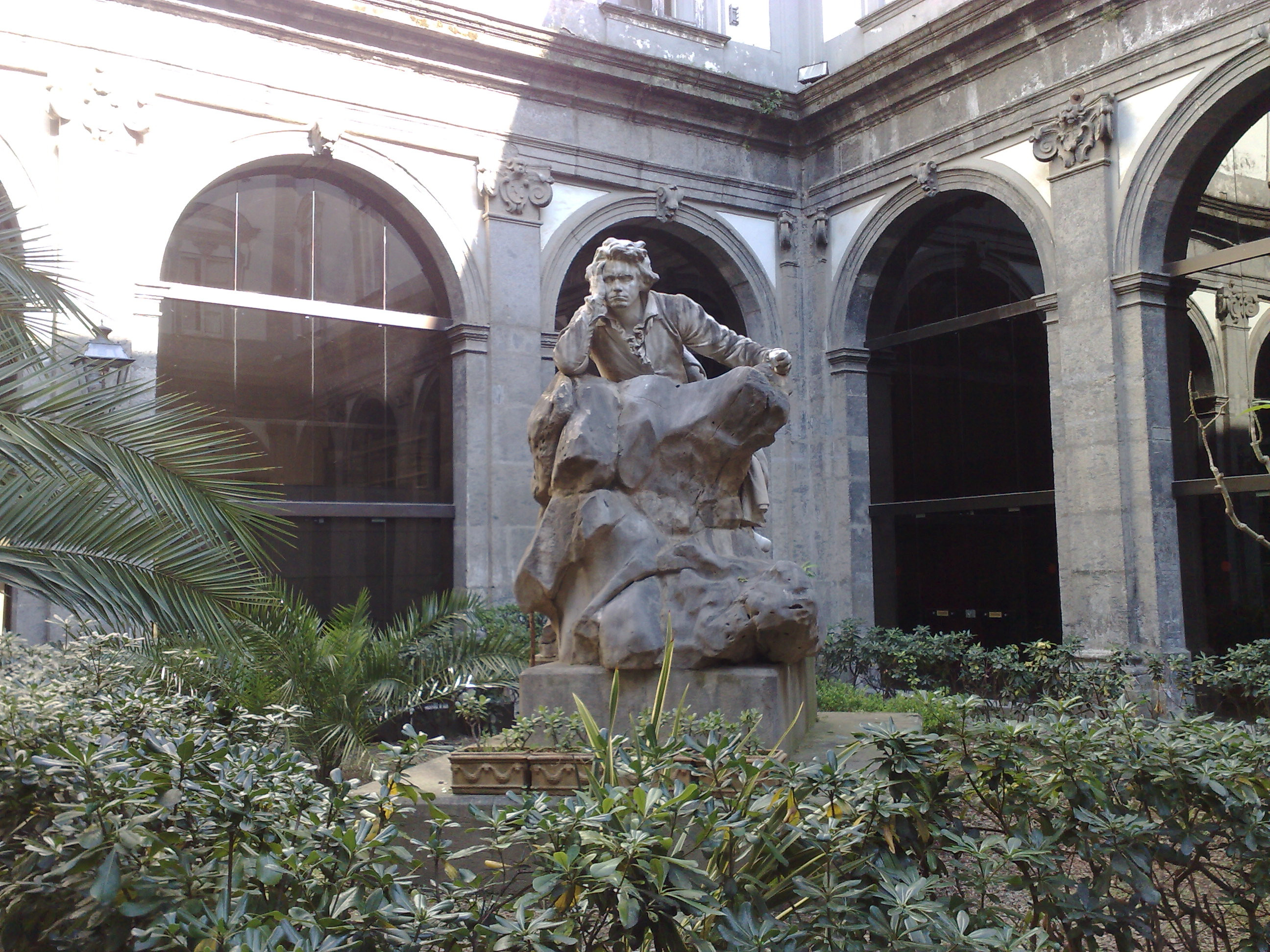 Beethoven, presso il Conservatorio di San Pietro a Majella (Napoli). Scultura di Francesco Jerace del 1985.